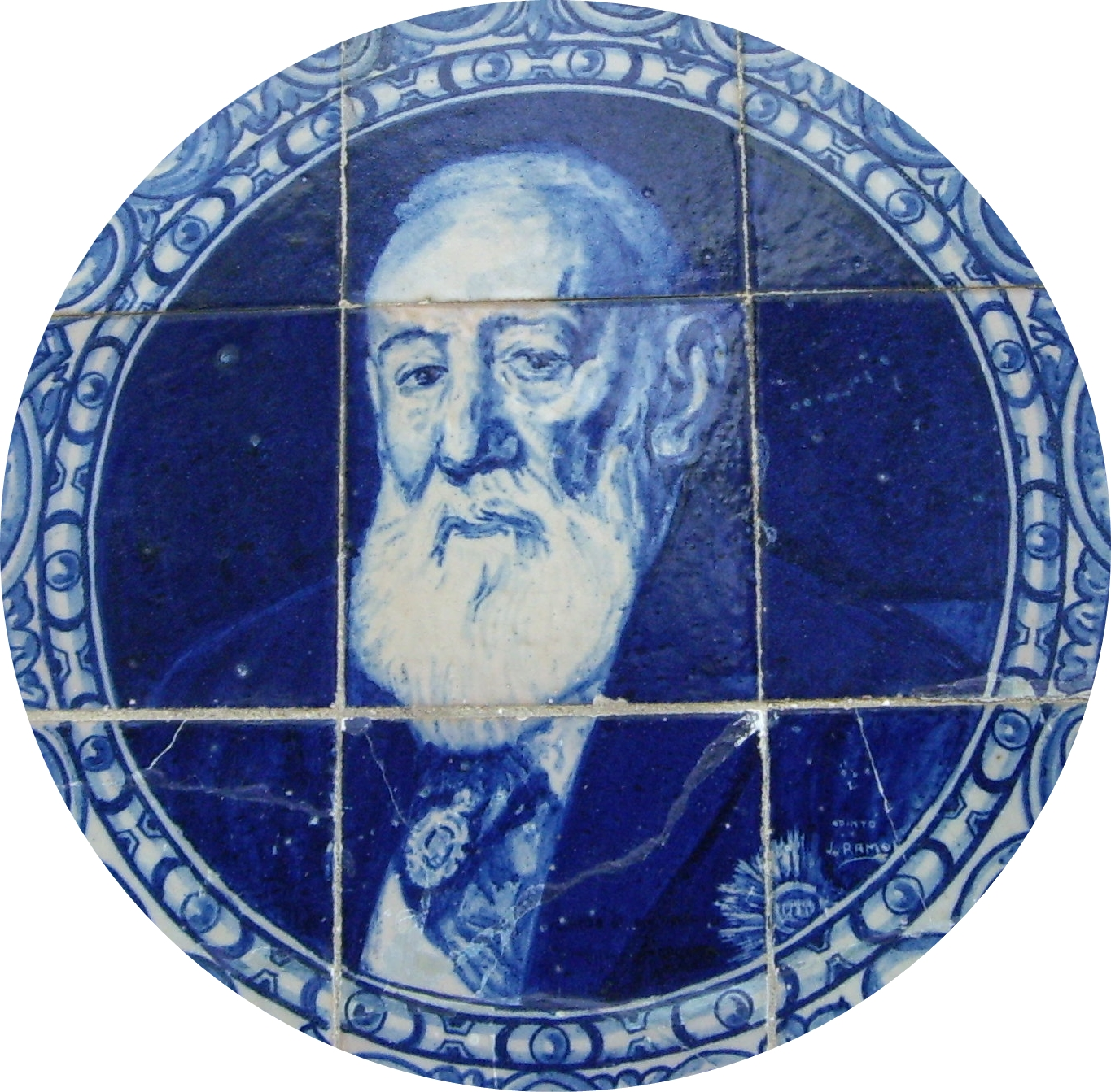 Francisco Rodríguez Marín en un azulejo en la glorieta con su nombre del Parque de María Luisa de Sevilla, en España.